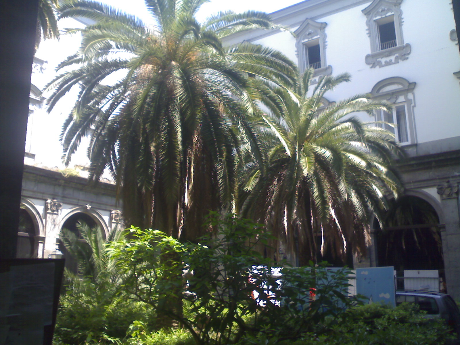 Scordio del Chiostro di San Pietro a Majella (Napoli)